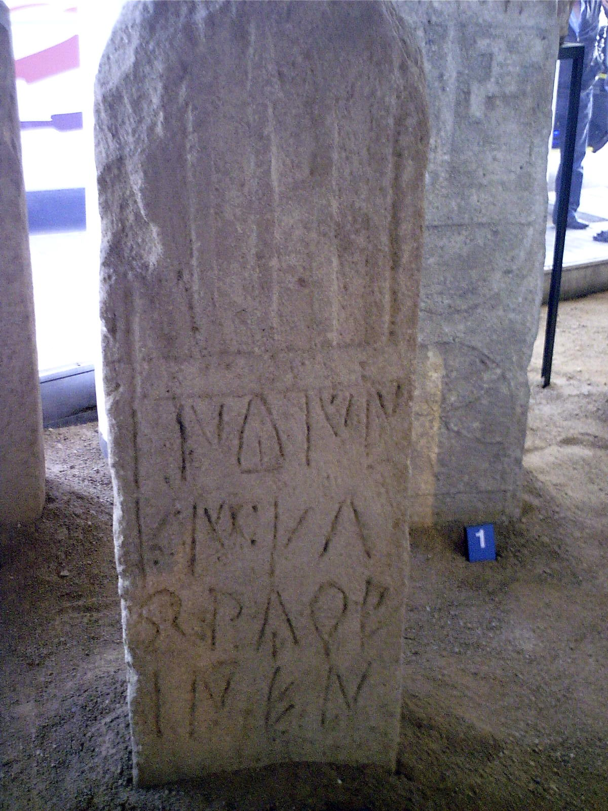 Estela funerària Ibèrica, decorada i amb l'inscripció "BANTUIN MI MLBEBIUR EBANEN" (Per a Bantium de Mlbebiur o De Bantium de Mlbebiur). Es troba al Museu de Badalona, Badalona, Barcelonès, (Catalunya).